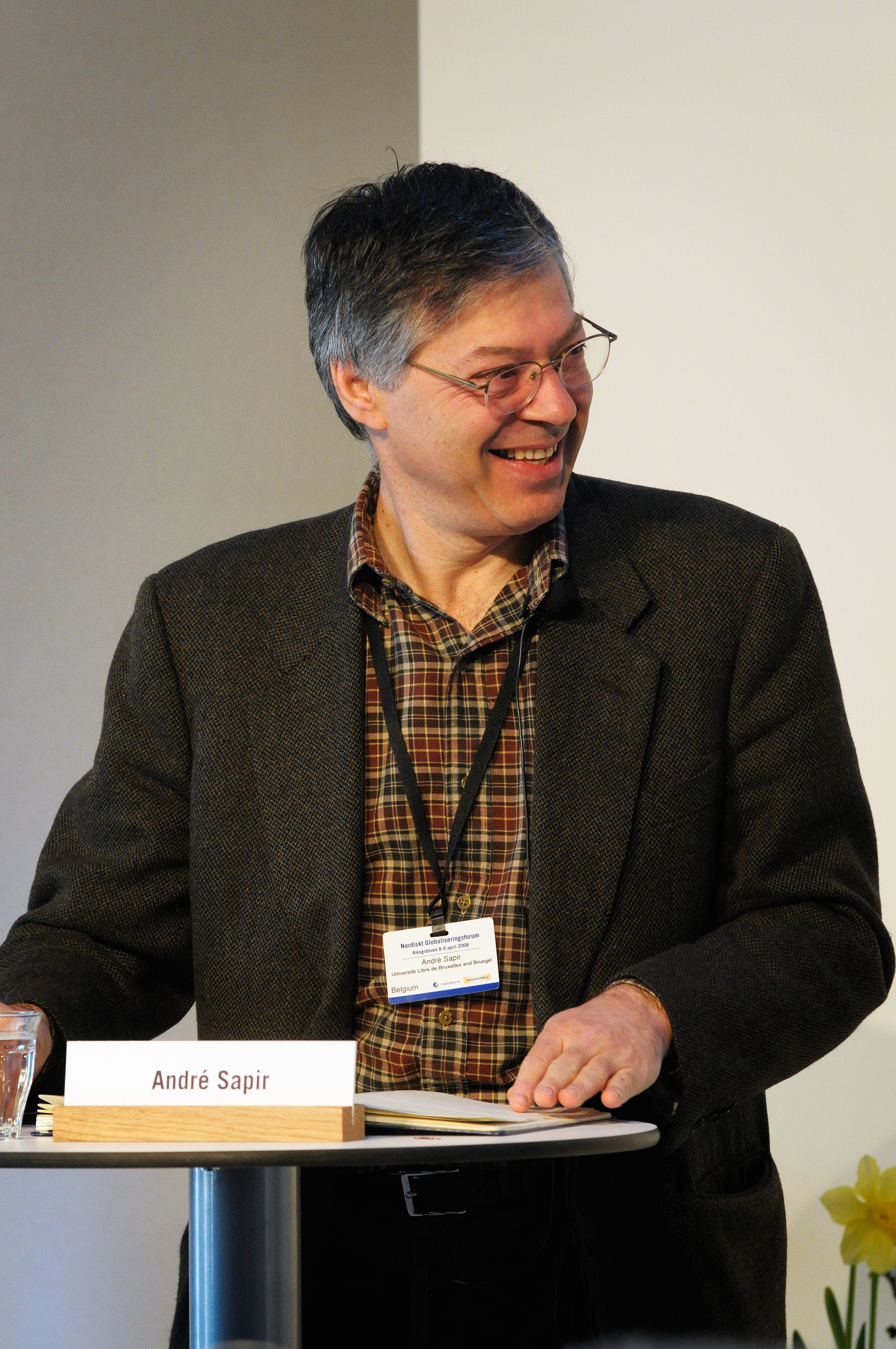 André Sapir från Université Libre i Bryssel talar vid globaliseringsmötet i Riksgränsen 2008-04-09.